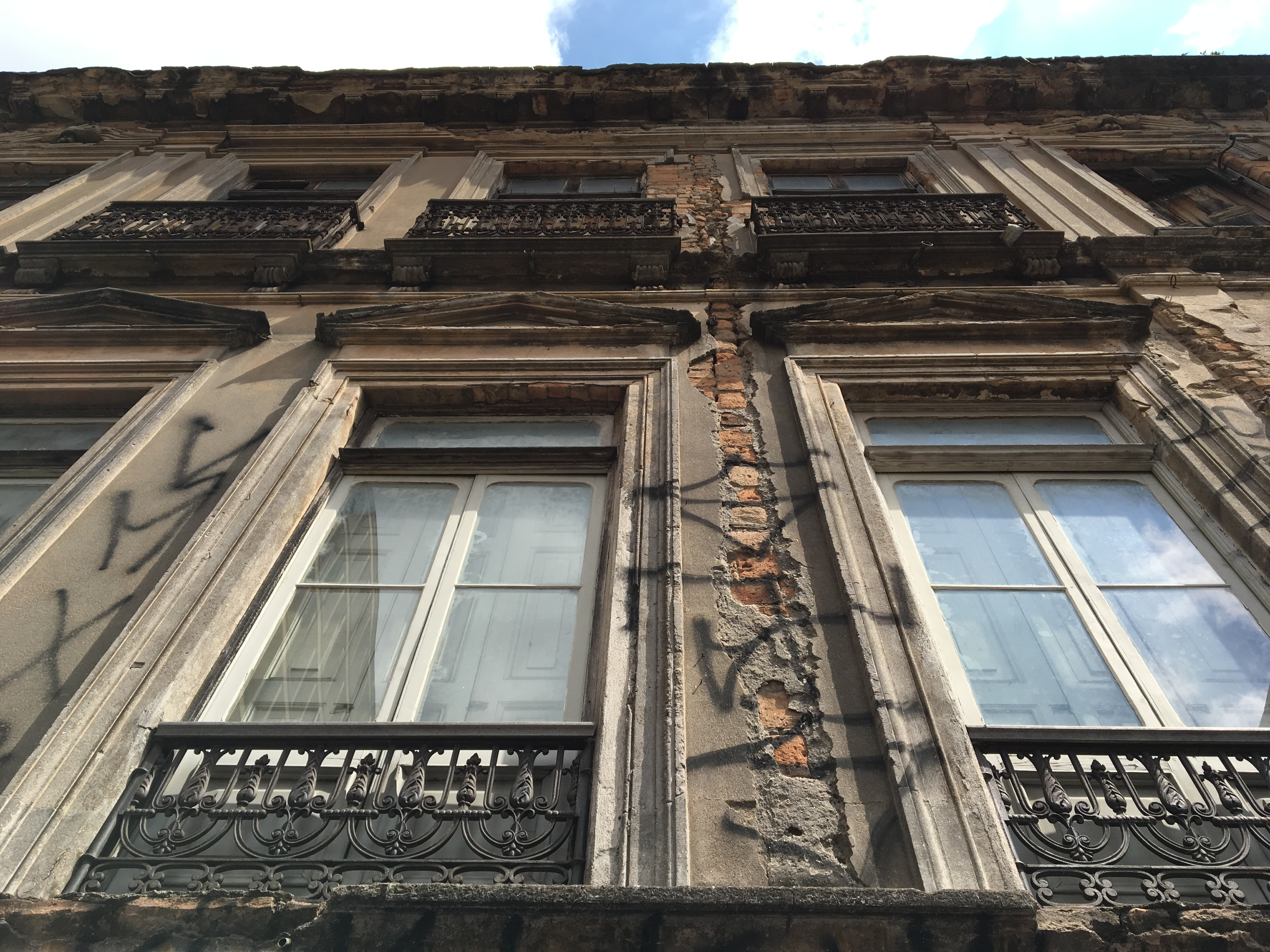 Detalhes da fachada do Casarão Marieta Teixeira de Carvalho, em São Paulo (SP), Brasil.